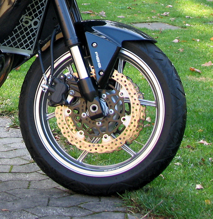 Motorradbremse vorne, Doppelscheibenbremse mit 2 Kolben Schwimmsätteln (Kawasaki Z 750)